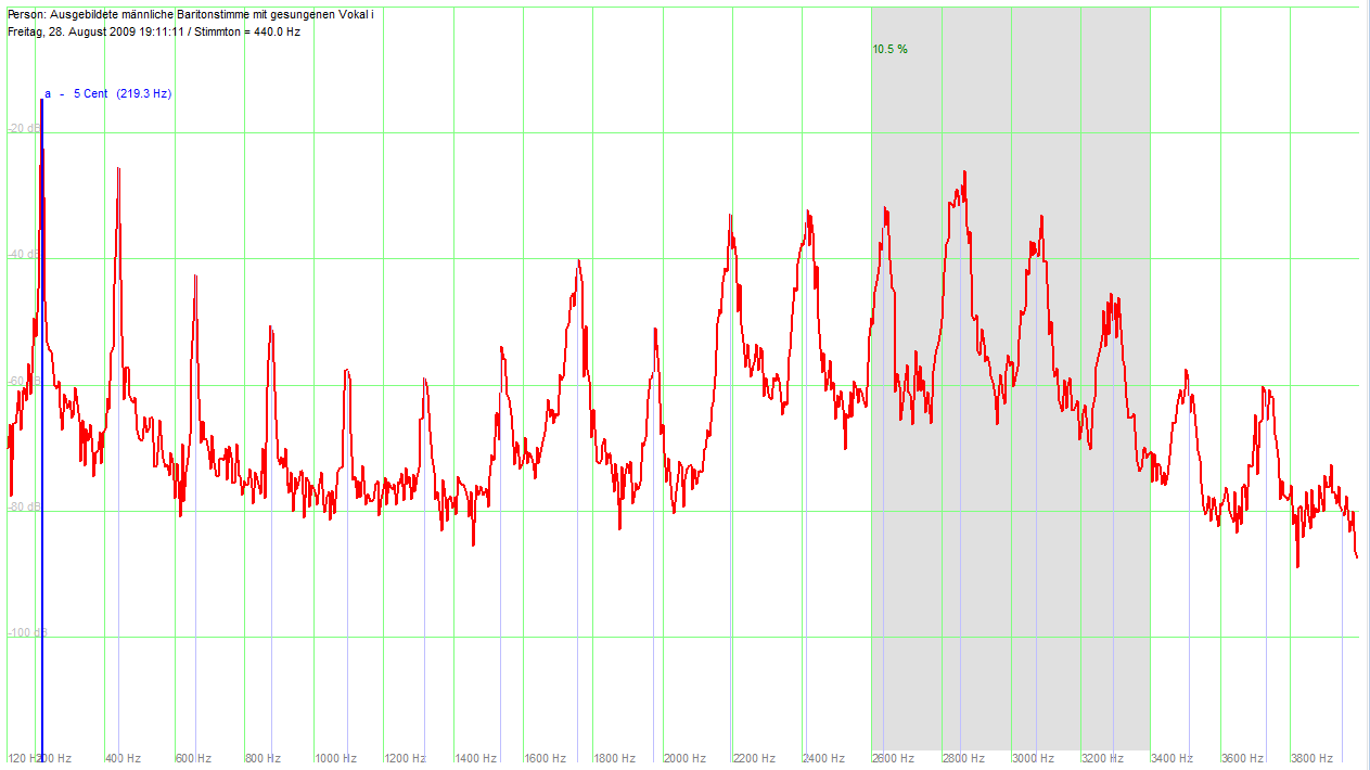 Von einem ausgebildeten Bariton gesungener Vokal i